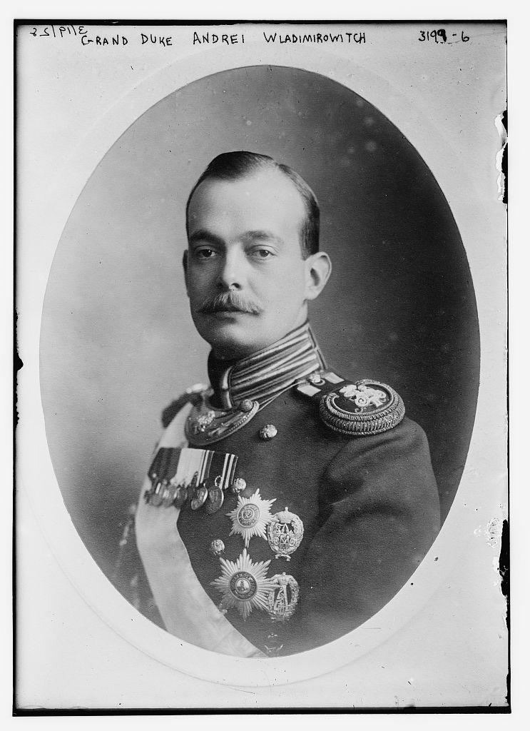 Grand Duke Andrei Wladimirowitch